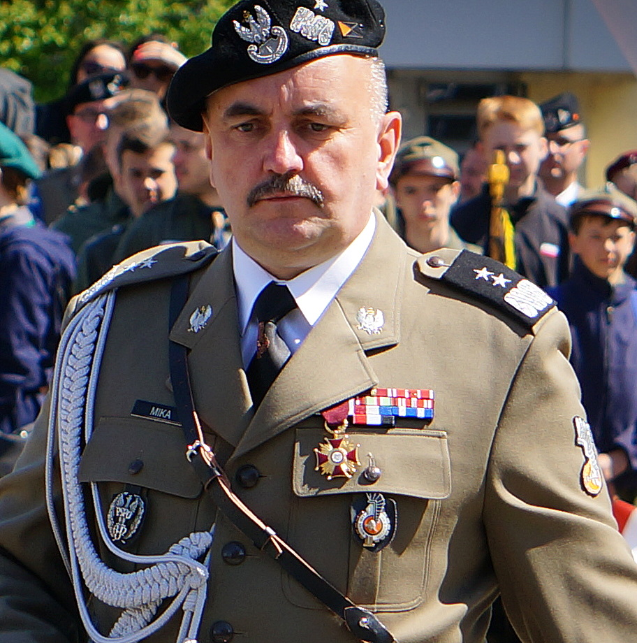 gen. dyw. Jarosław Mika, dowódca 11 Lubuskiej Dywizji Kawalerii Pancernej.